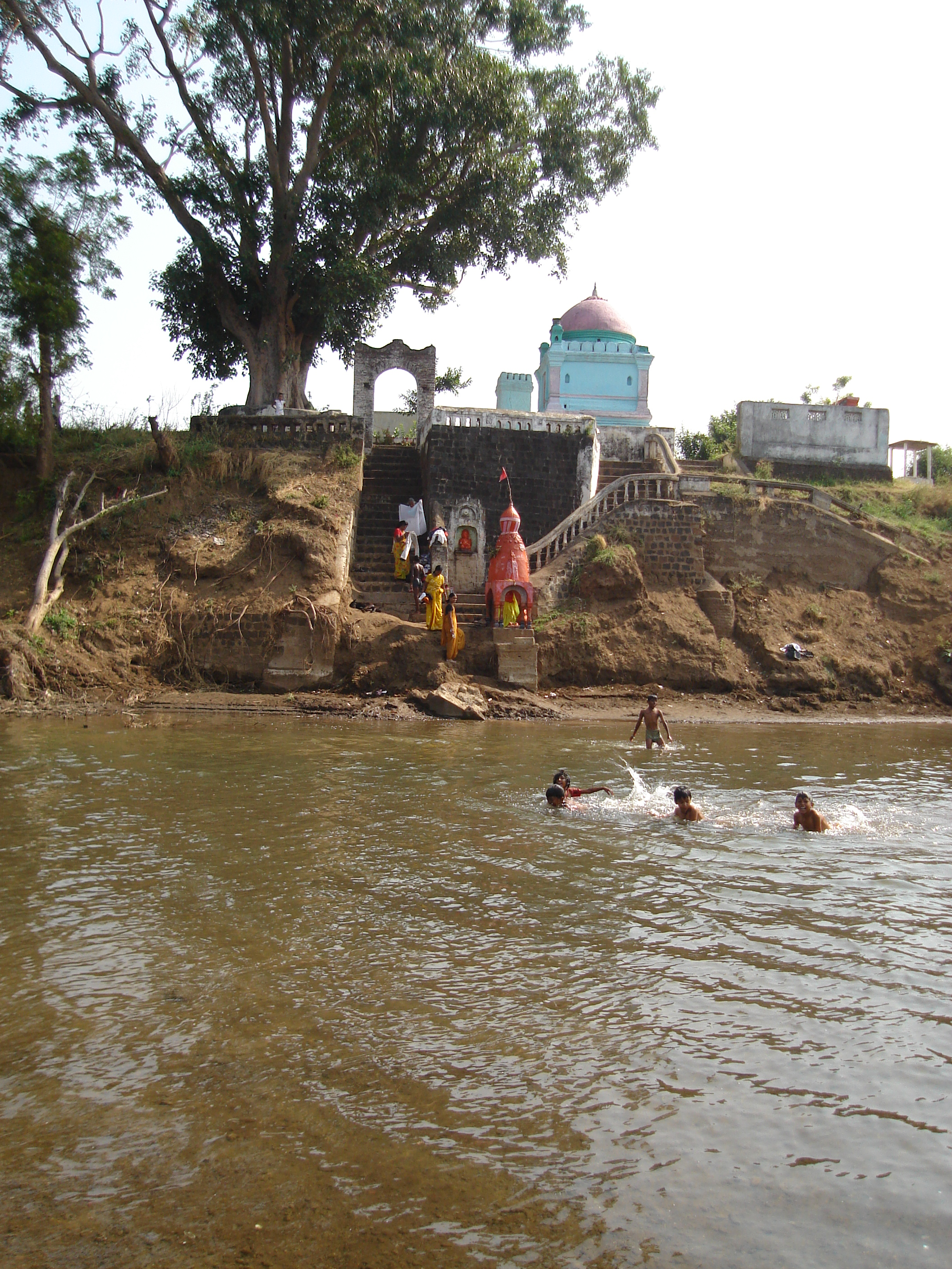 A Pilgrimage "gangamai Temple banks of the Purna river . DIST.AMRAVATI